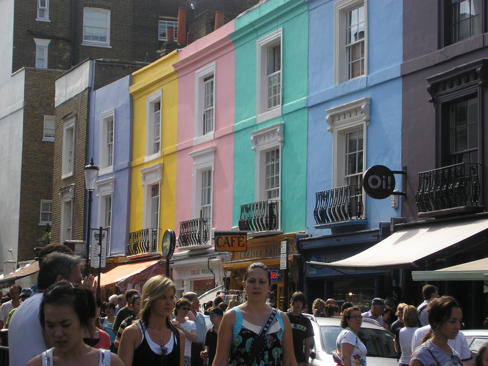 Descr.